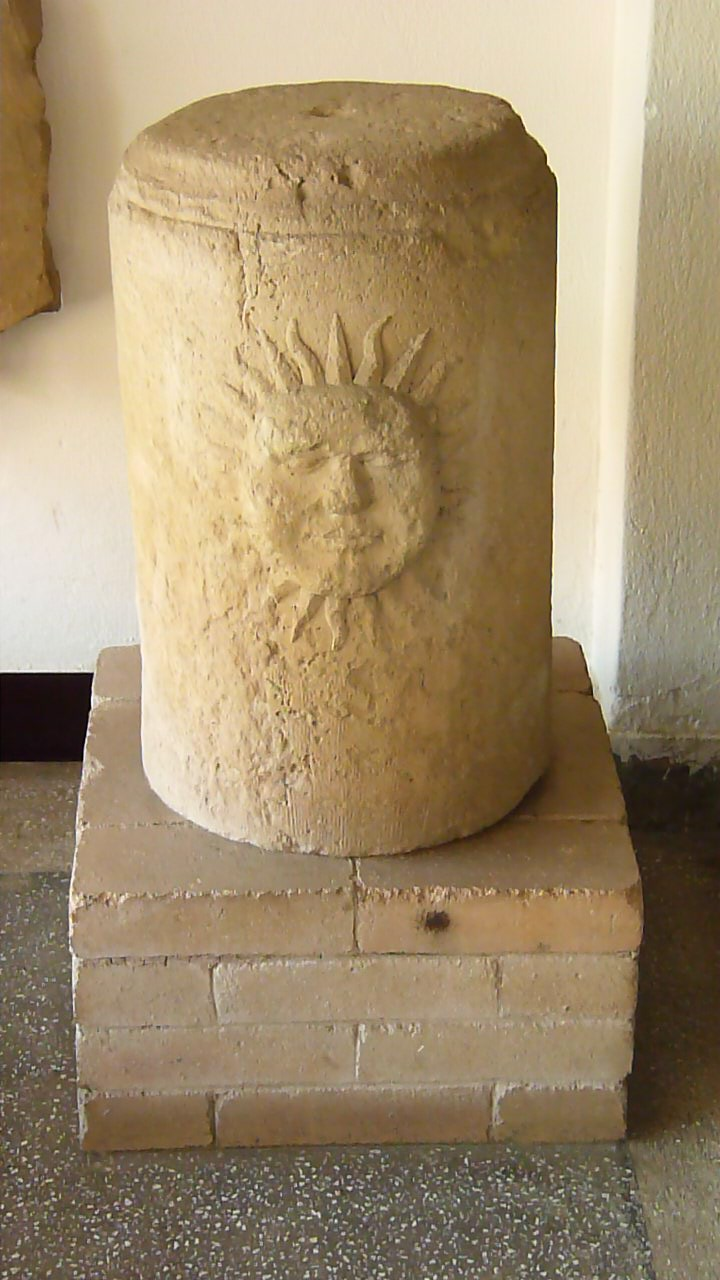 A felvétel 2013. június 19 -én készült Székelykeresztúron. Napkő. ©© Published under Creative Commons in the Metapolisz DVD line. All of the photos and vids in the Metapolisz DVD line are under Creative Commons and can be used even for commercial – for profit – purposes. Recommended Citation Derzsi Elekes Andor: Metapolisz DVD line